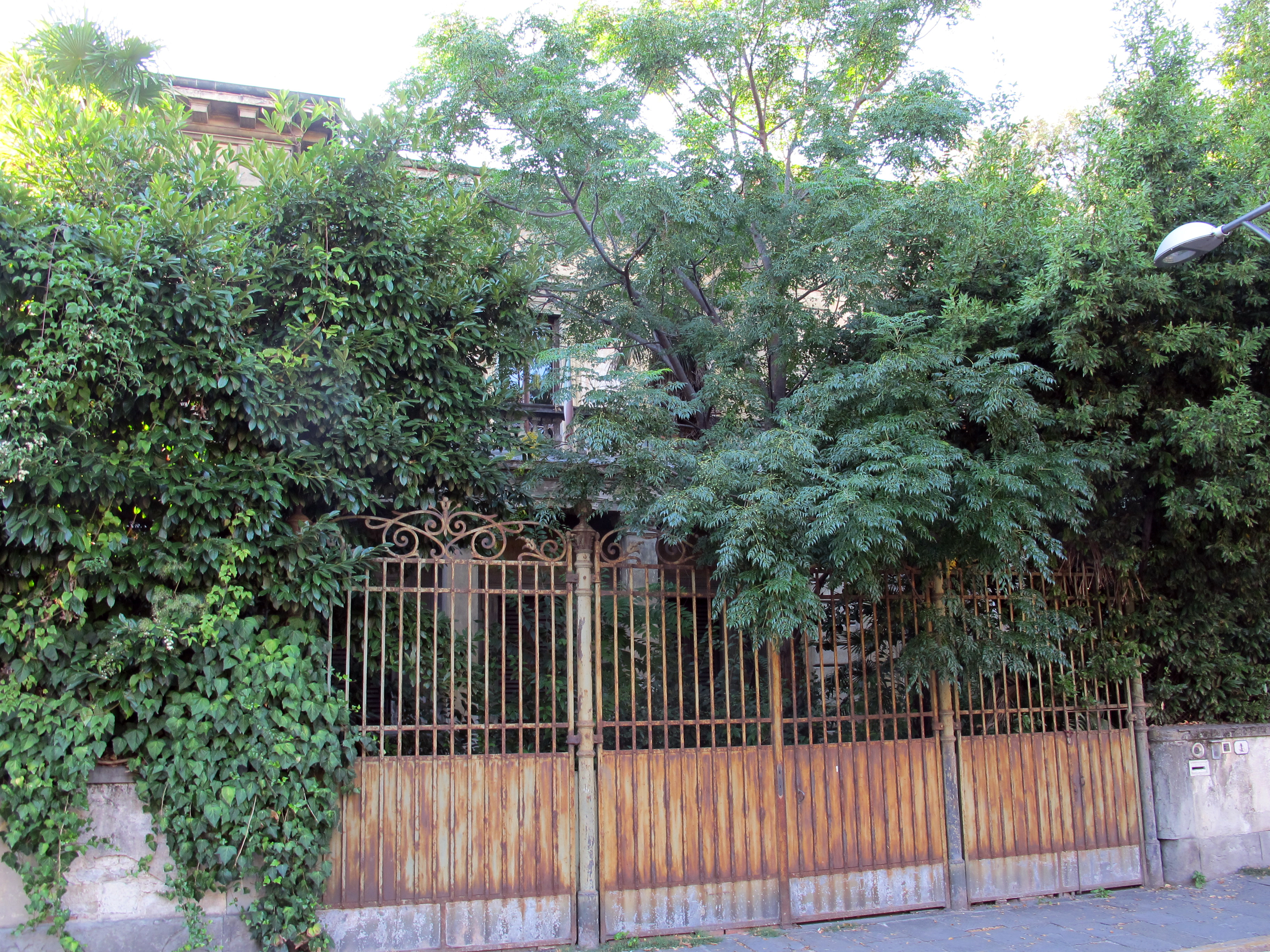 Firenze